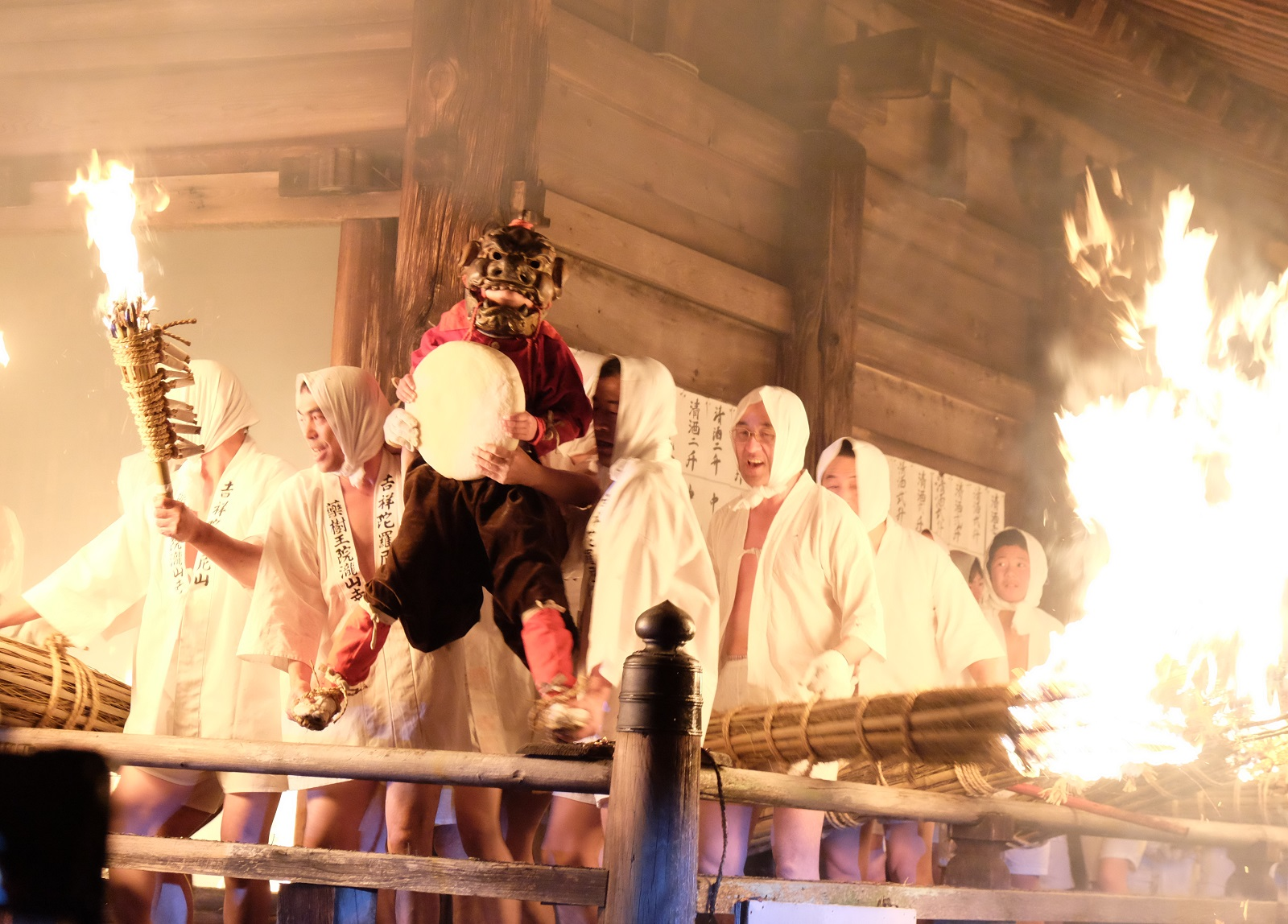 滝山寺鬼まつり（岡崎市滝町）